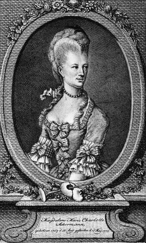 Einer der zahllosen Stiche von Charlotte Ackermann, die nach ihrem frühen Tod erschienen.